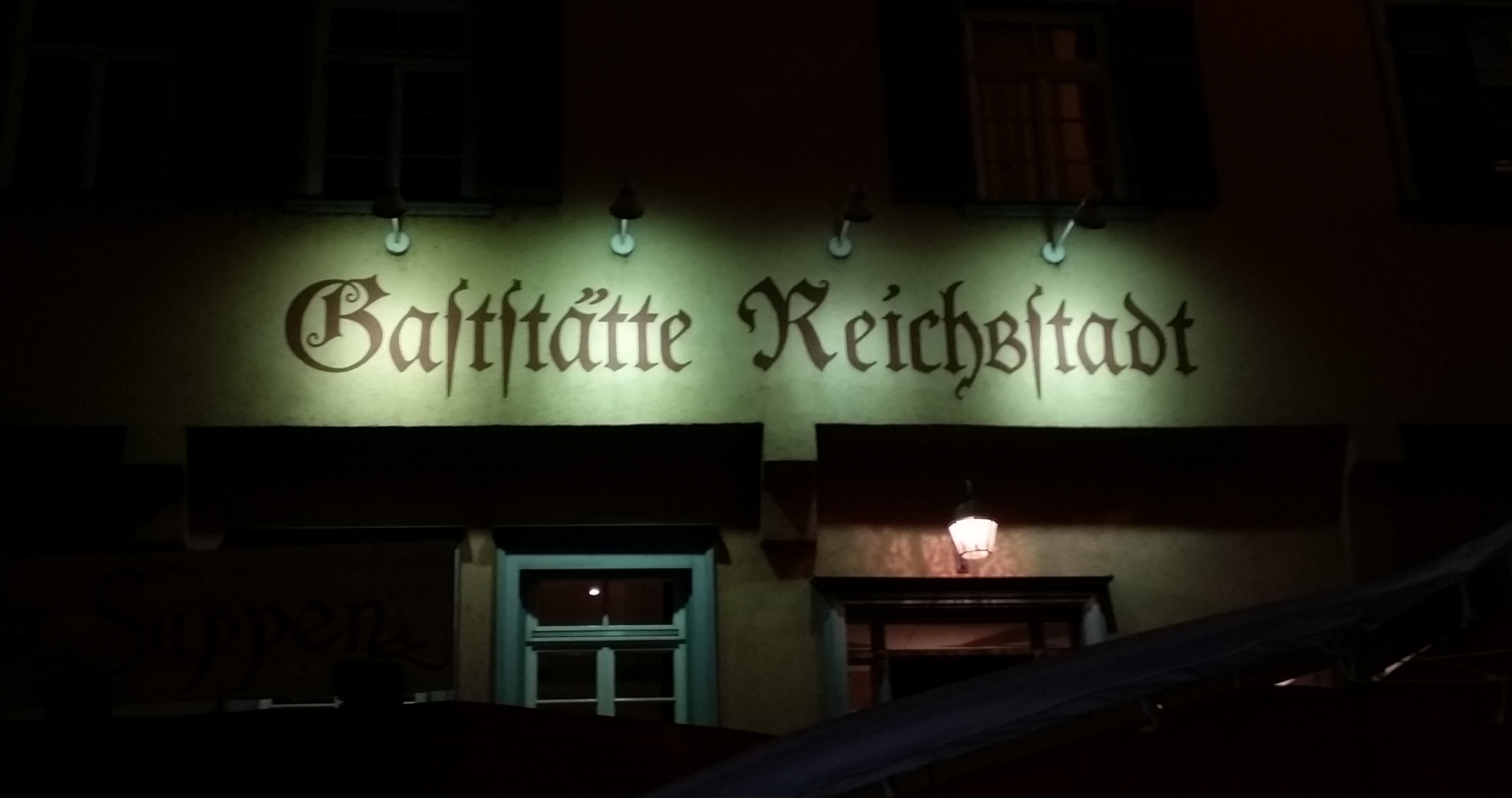 Gaststätte Reichsstadt in Esslingen am Neckar mit Verwendung des langen und runden s nach Frakturregeln